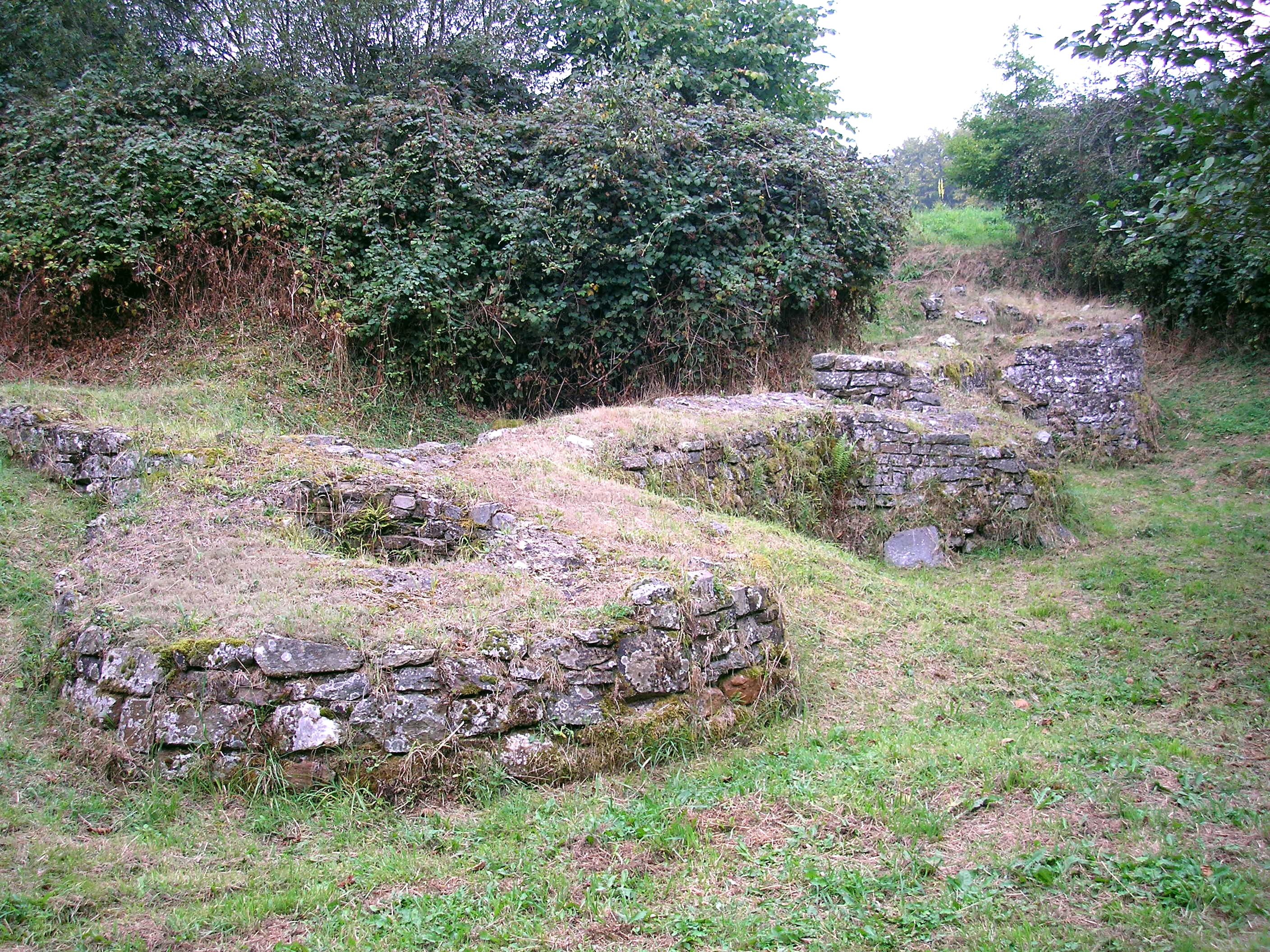 Le Plessis-Grimoult (Normandie, France). Le jardin fortifié.